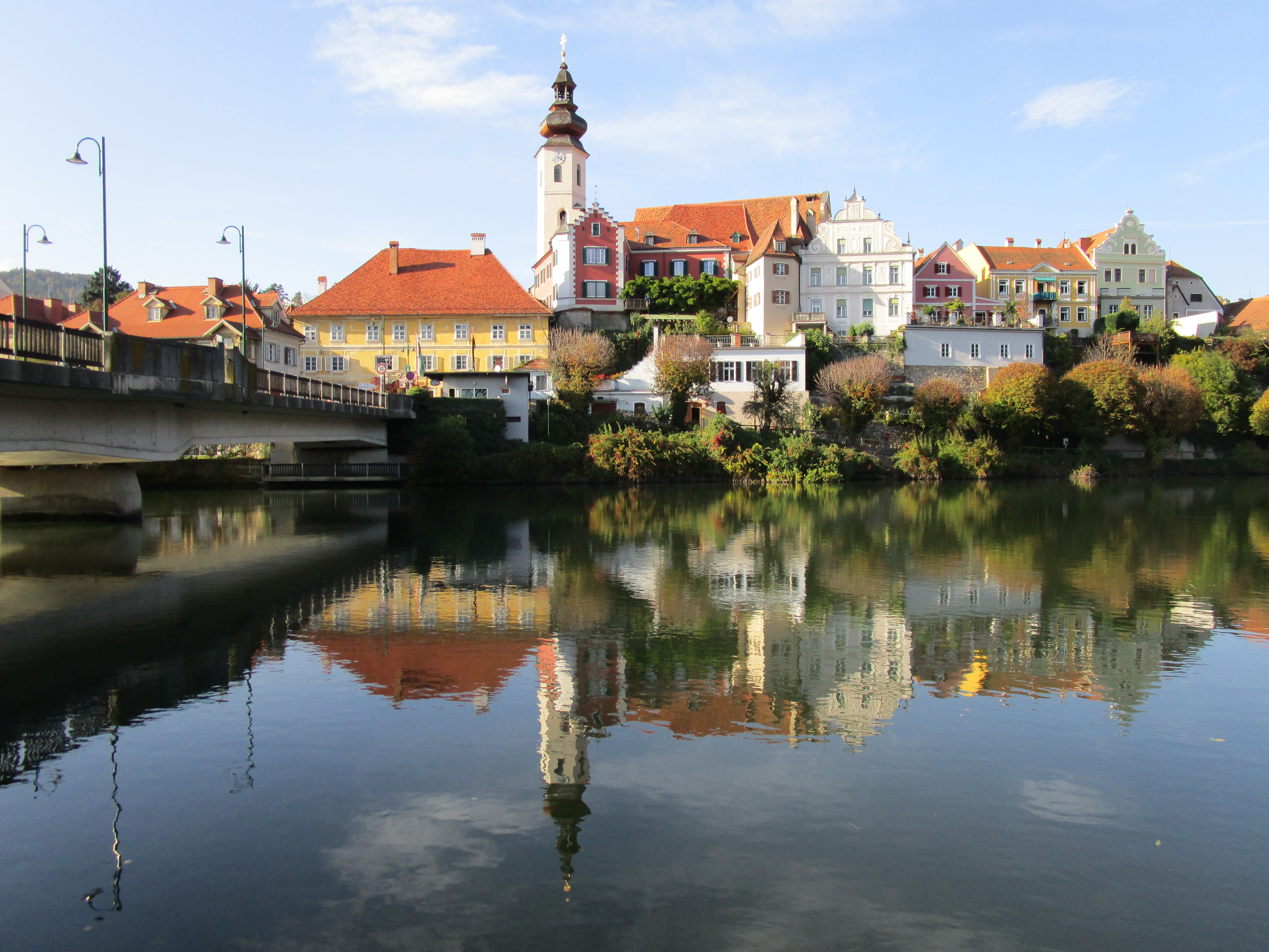 Blick über die Mur auf die historische Altstadt von Frohnleiten